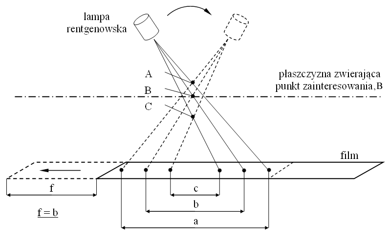 Idea działania tomografii planarnej. Synchroniczny ruch lampy rentgenowskiej i filmu rozmywa punkty nieznajdujące się w płaszczyźnie zainteresowania (punkty A i C). Ich obrazy będą rzutowane w różnych miejscach filmu (odcinki a i c). Tylko obraz punktu znajdujący się w płaszczyźnie zainteresowania (B) będzie rzutowany zawsze w to samo miejsce filmu (odcinek b równy przesunięciu filmu, f).